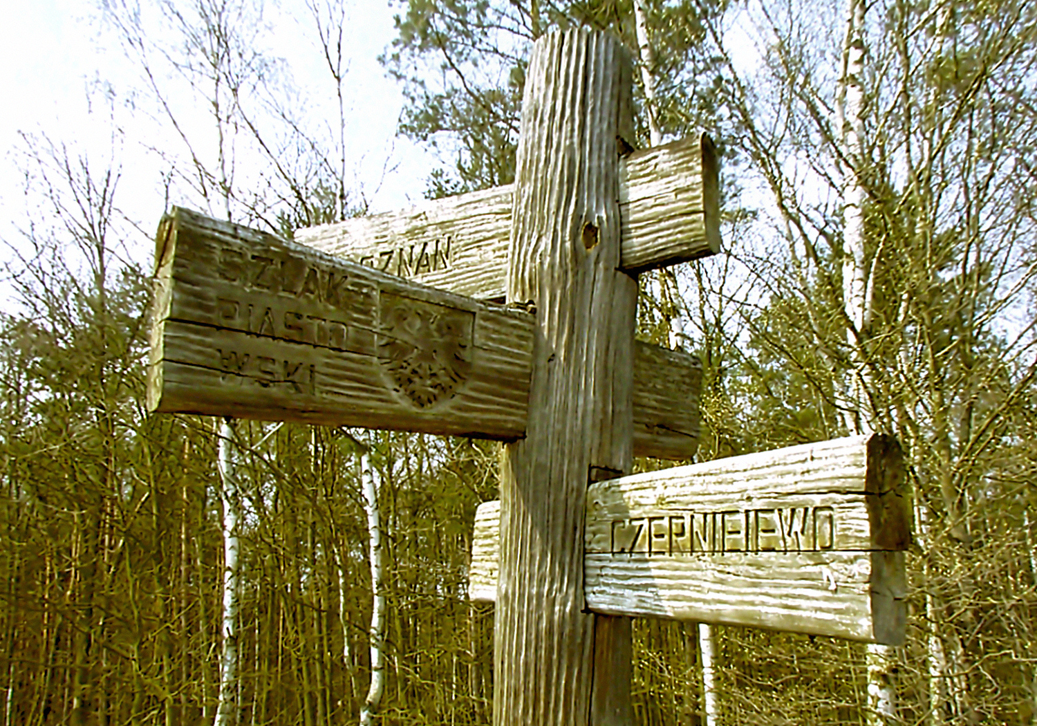 Rakowo-Lipki (gm. Czerniejewo), drogowskaz Szlaku Piastowskiego